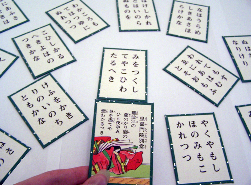 Cartes du jeu japonais karuta avec carte de kana correspondante au-dessus de la carte avec waka